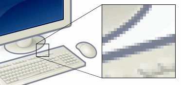 Exemple de pixels en escala de grisos.